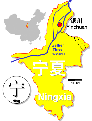 Ningxia